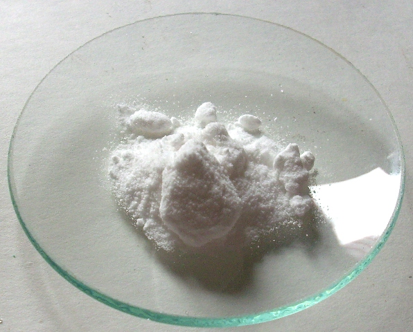 H3BO3